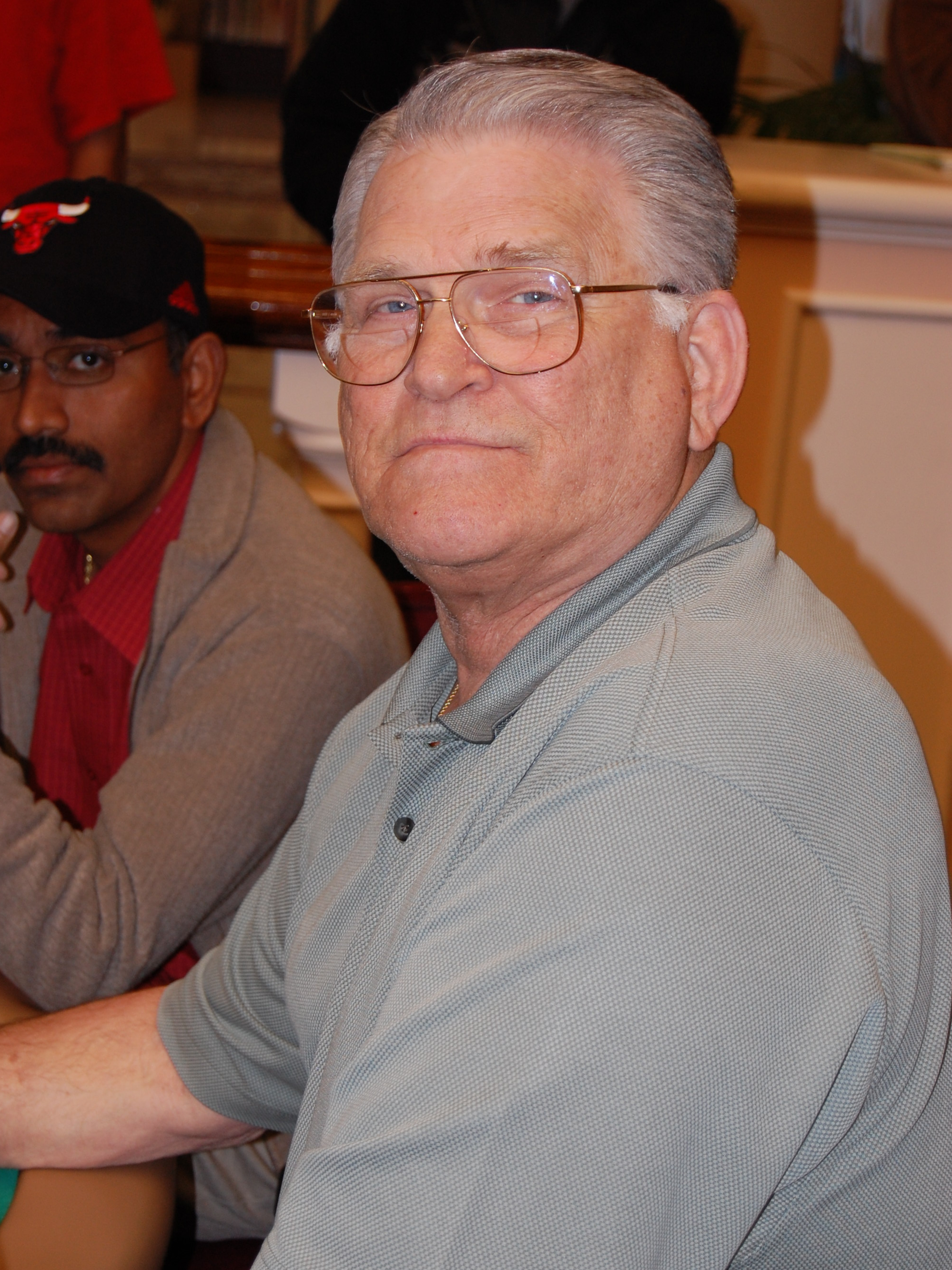 T. J. Cloutier beim Bay 101 Shooting Star